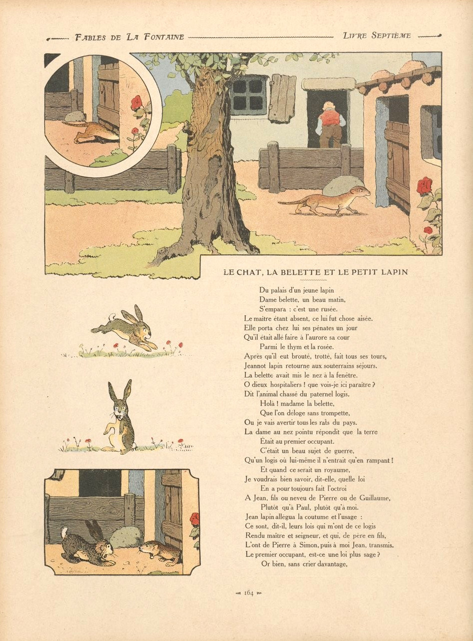 Fables de La Fontaine illustrées par Benjamin Rabier : Le chat, la belette et le petit lapin